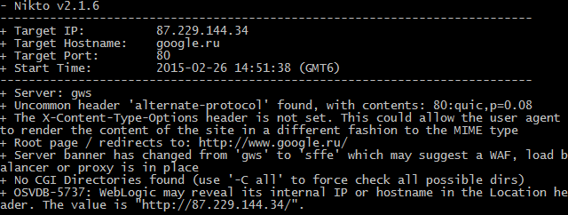 Screenshot running program Nikto